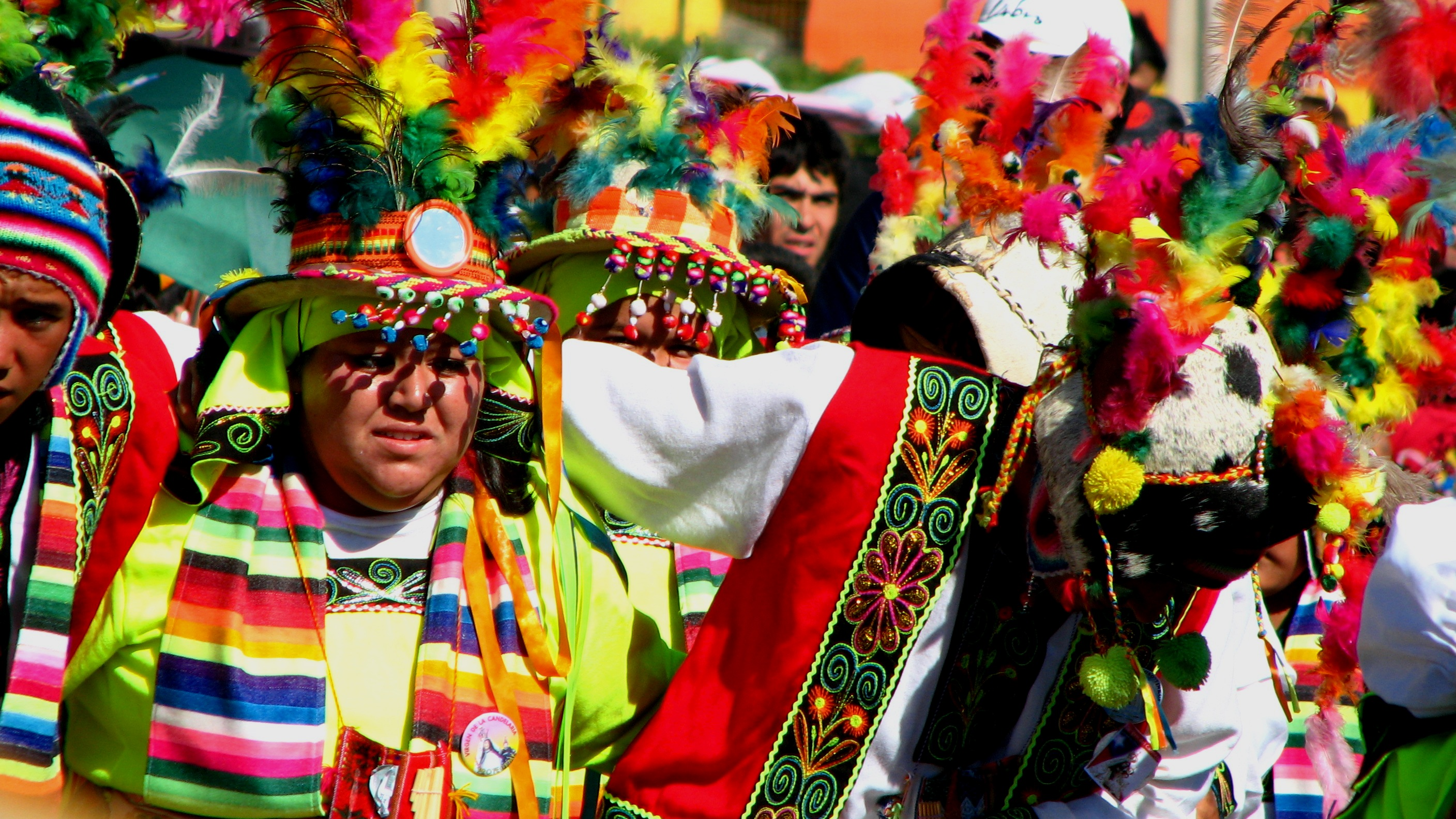 El significado de la palabra Tinku es "encuentro" (de la palabra quechua tinkuy, encontrarse) lugar: fiesta religiosa de la Candelaria, Copiapo Chile.